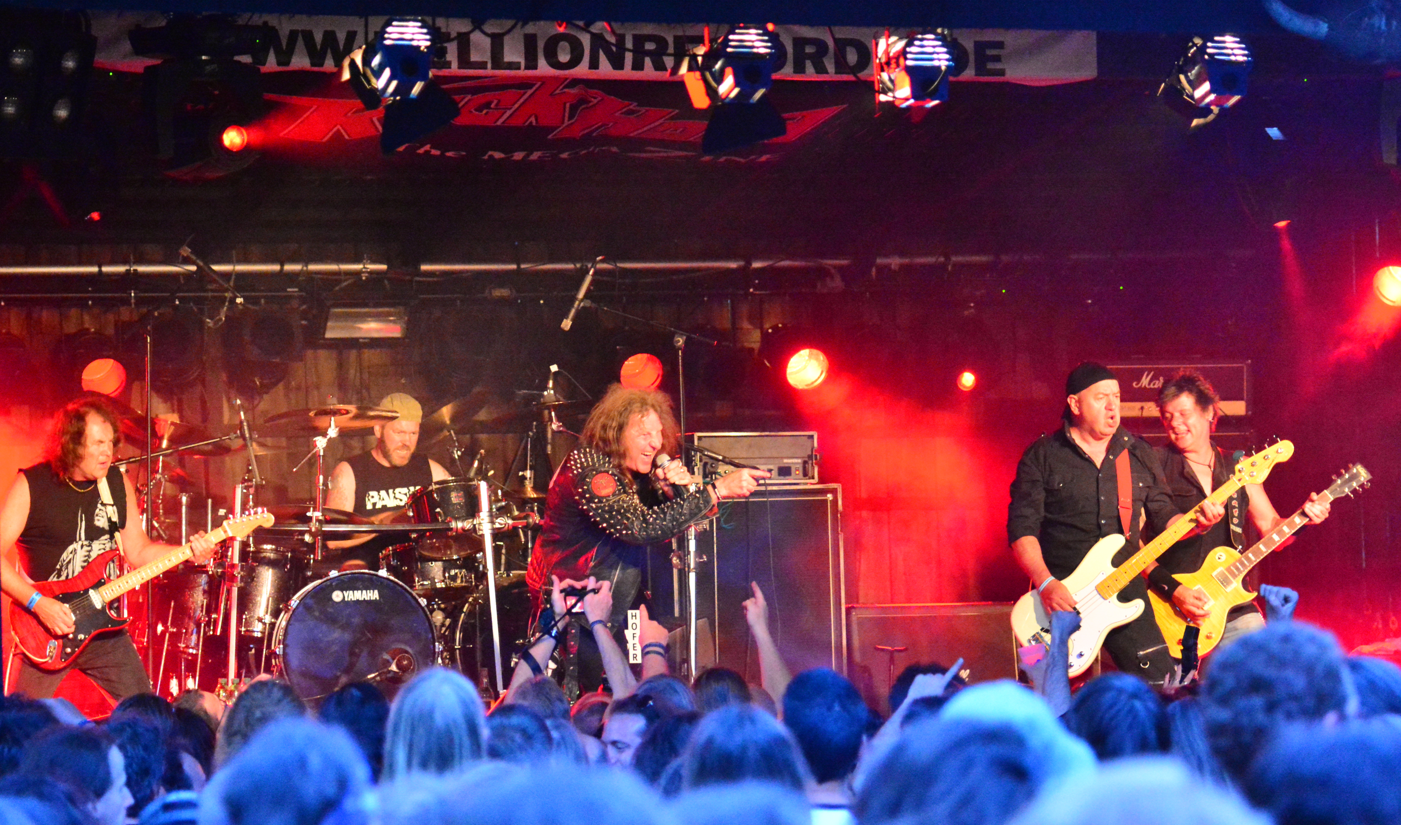 Oliver/Dawson Saxon beim Headbangers Open Air 2014